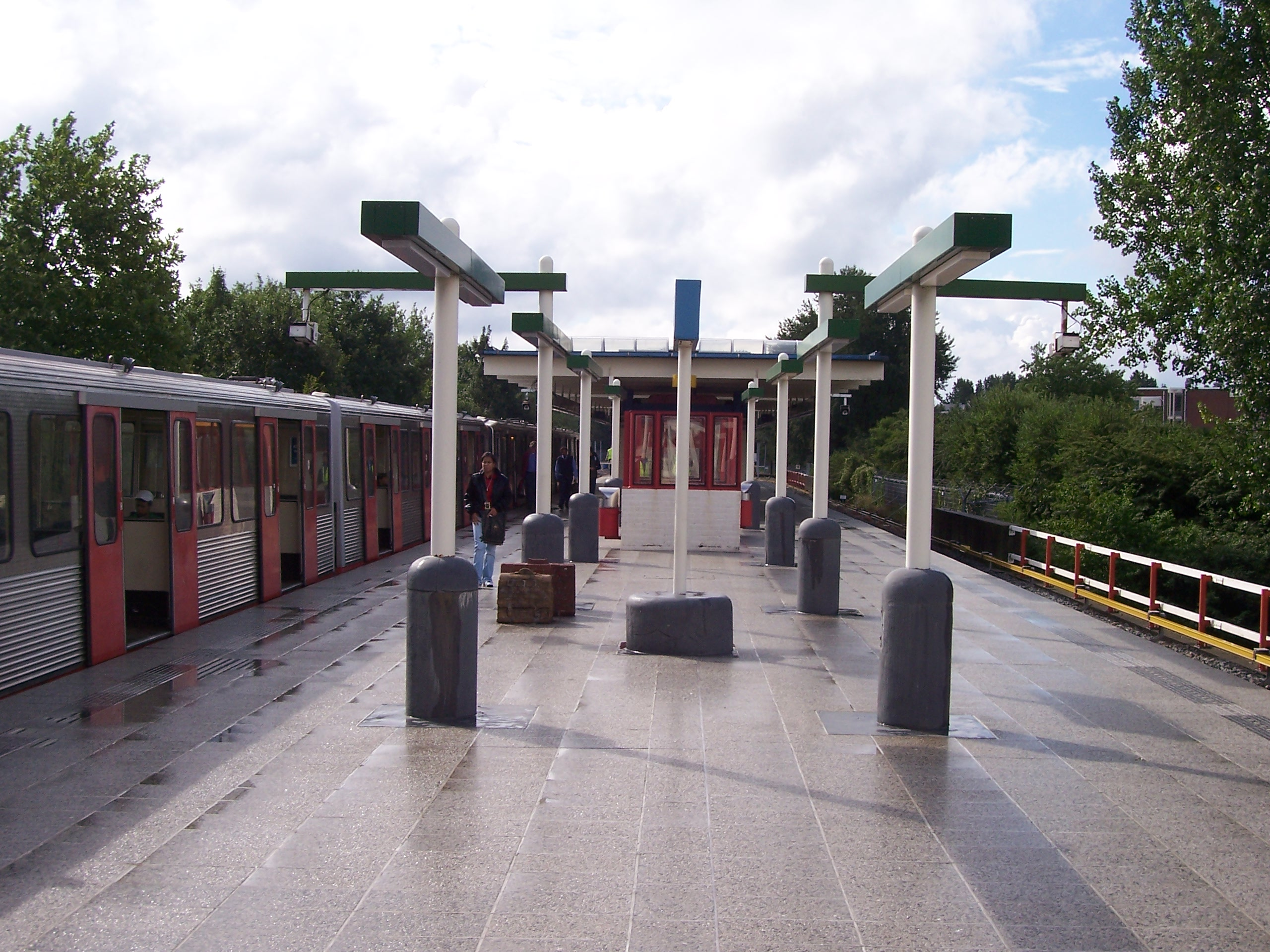 Metrostation Gaasperplas